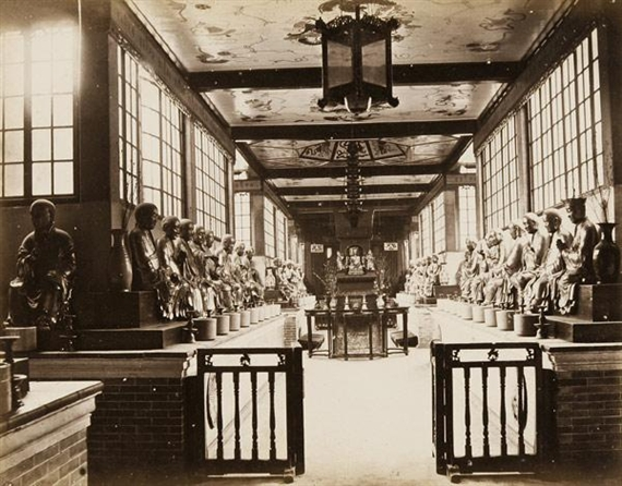 廣州市華林寺五百羅漢堂，已於文化大革命期間被毀。